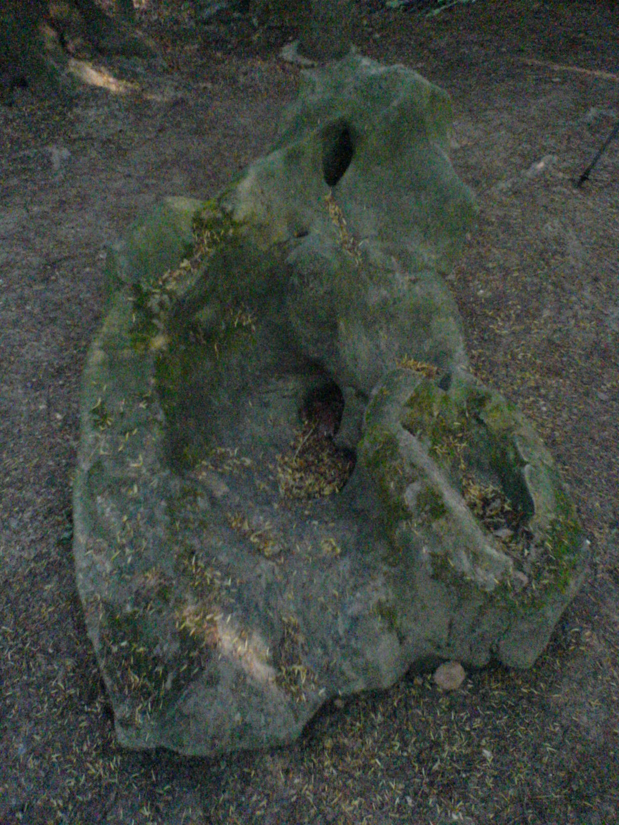 Pierre tombale à la sépulture de Louis-Augustin Bosc d'Antic au cimetière Bosc de la Forêt de Montmorency